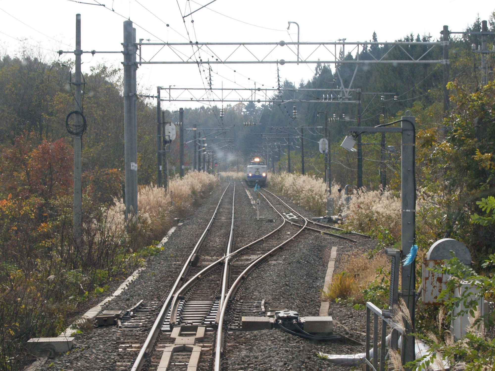 更科信号場（磐梯町寄りのポイント。郡山行列車の先頭から撮影）